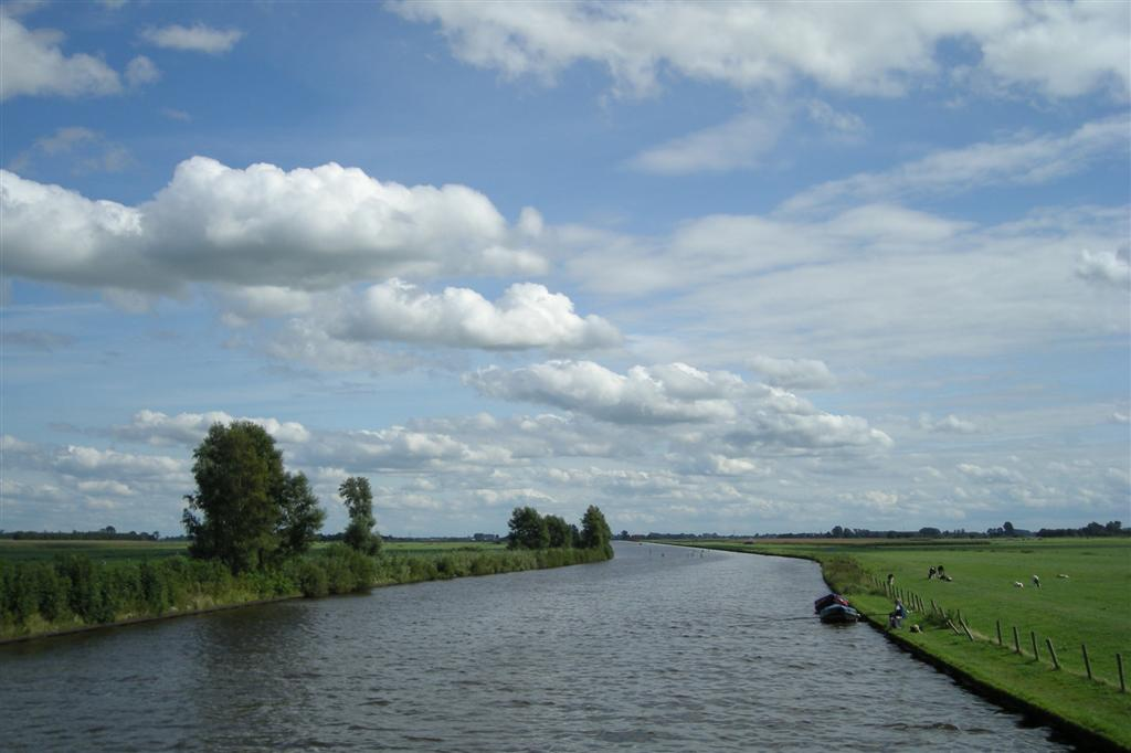 Broeresloot